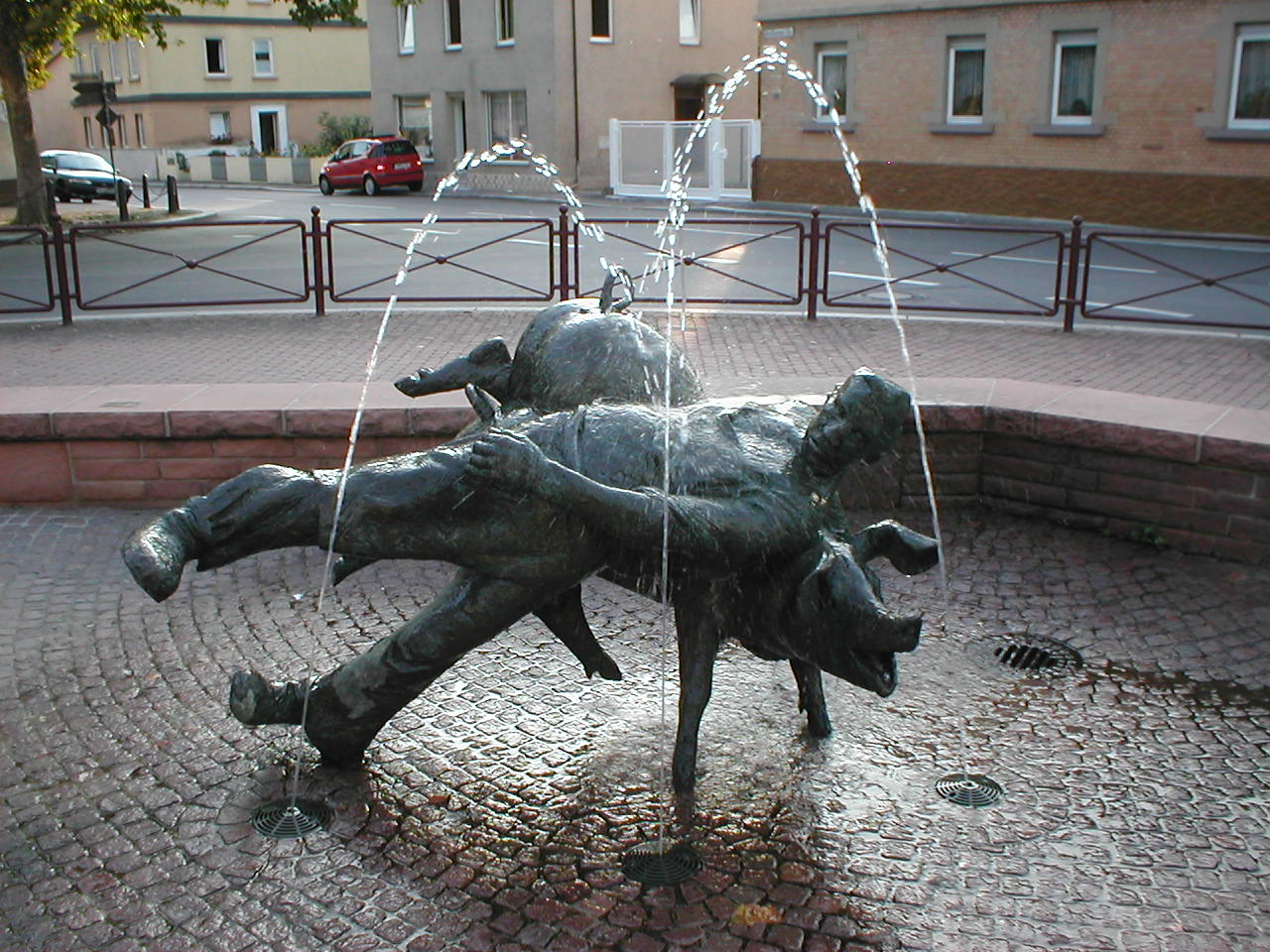 Brunnen von Kurt Tassotti in der Ortsmitte von Heilbronn-Sontheim. Der „Saureiterbrunnen“ greift den Utznamen (Ortsnecknamen) der Sontheimer auf.